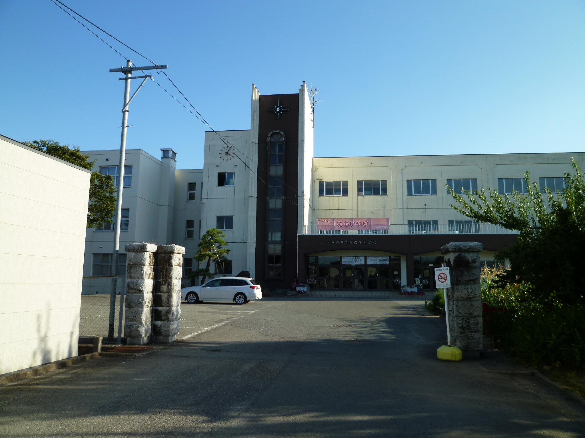 山形県立山辺高等学校（山形県山辺町）